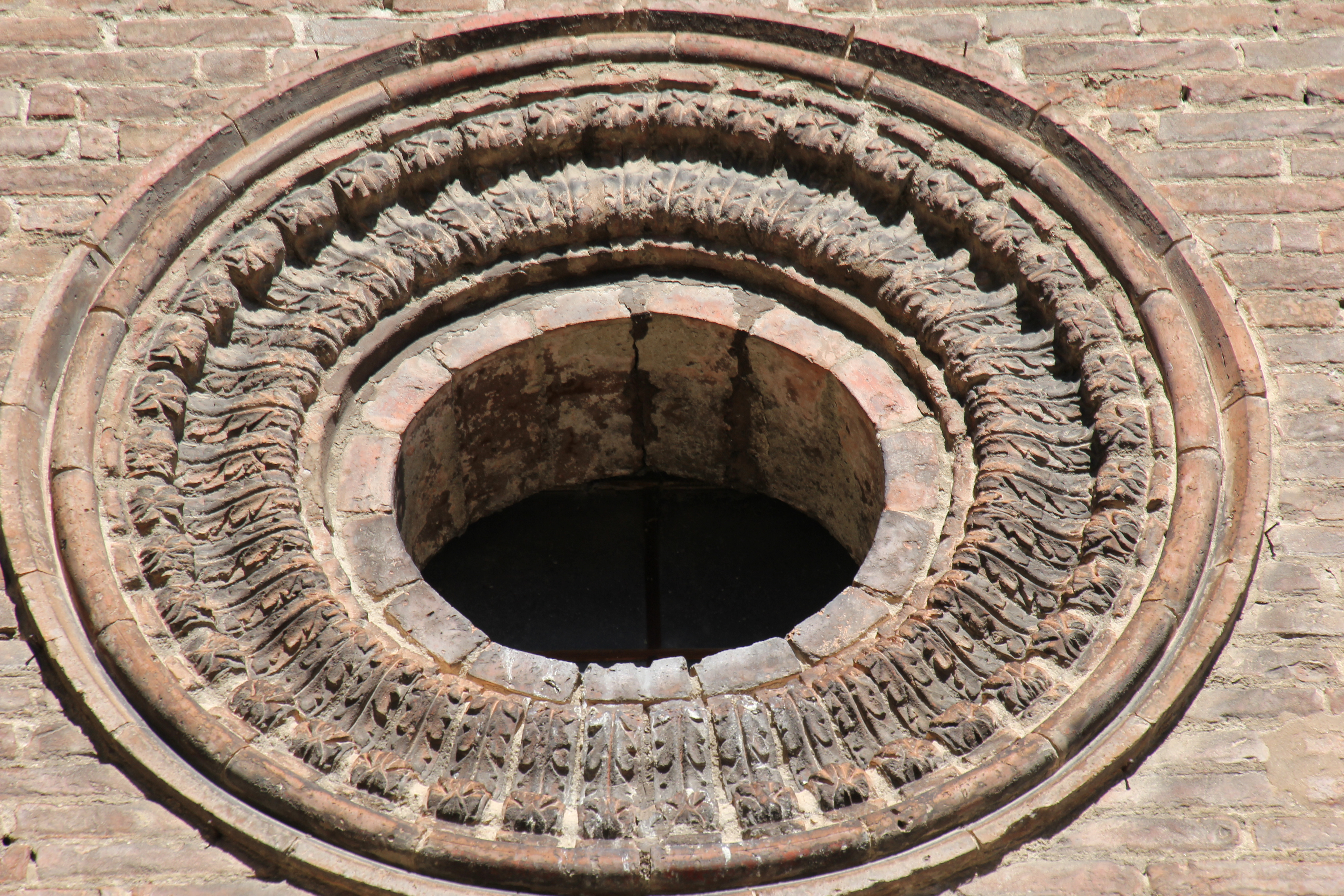 Ferrara, chiesa di San Giuliano